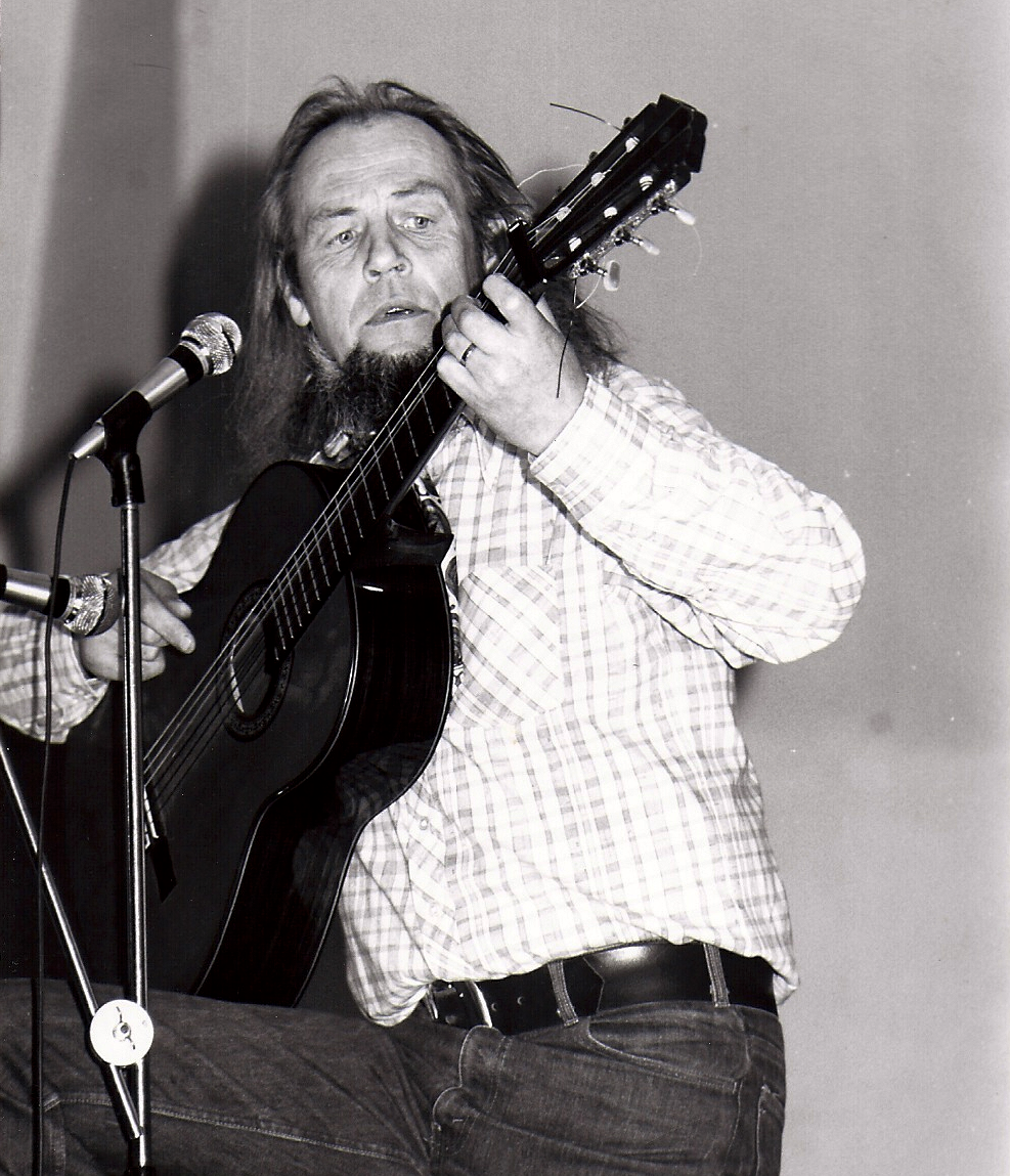 Glenmor, Milig Ar Skañv (Emile Le Scan), barde et pélerin breton (1931-1996)